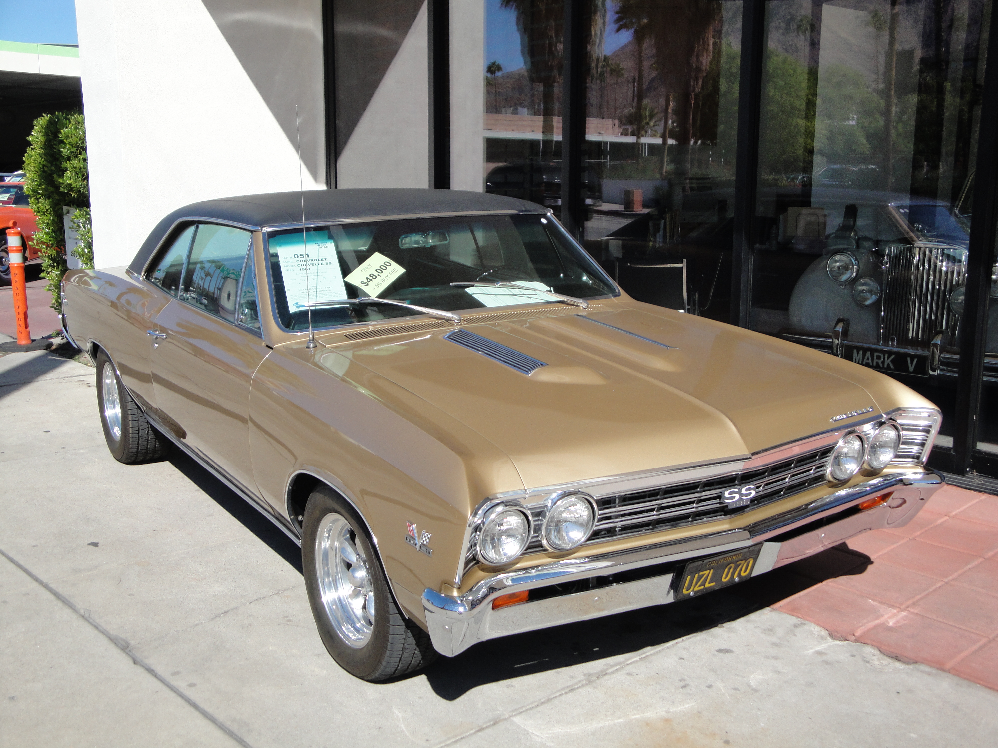 67 Chevrolet Chevelle SS